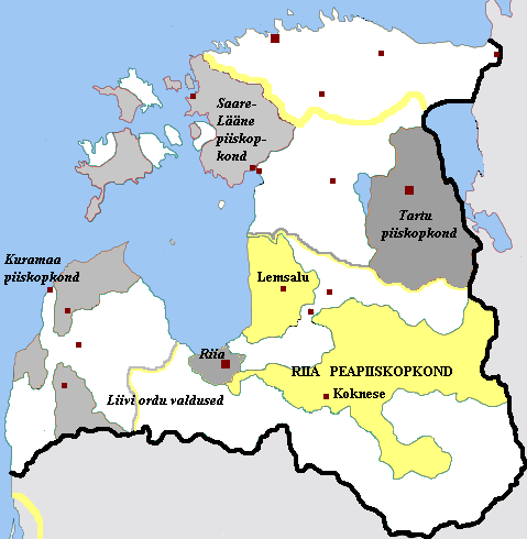 Riia peapiiskopkonna ilmalikud ja vaimulikud valdused Vana-Liivimaal